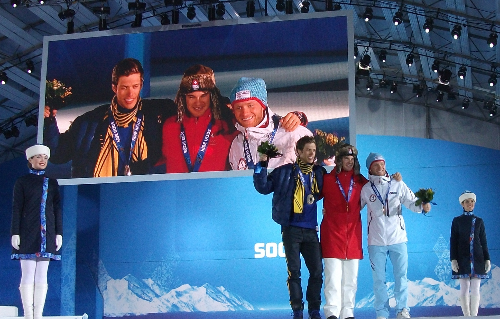 Церемония награждения победителей в скиатлоне на XXII зимних олимпийских играх в Сочи. Медал Плаза в Олимпийском парке Сочи.